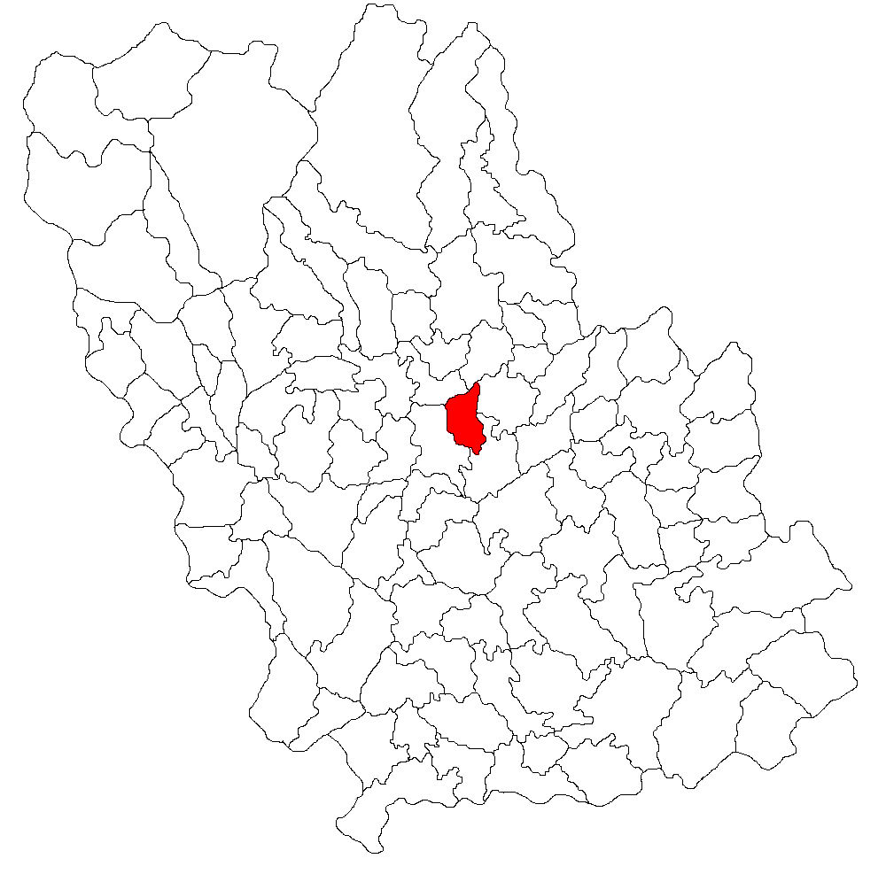 Categorie:Hărţi ale judeţului Prahova